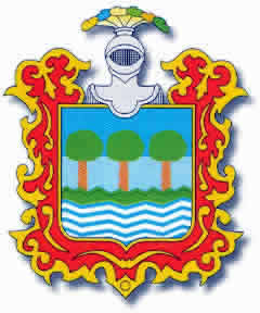 Escudo del Departamento de Cajamarca